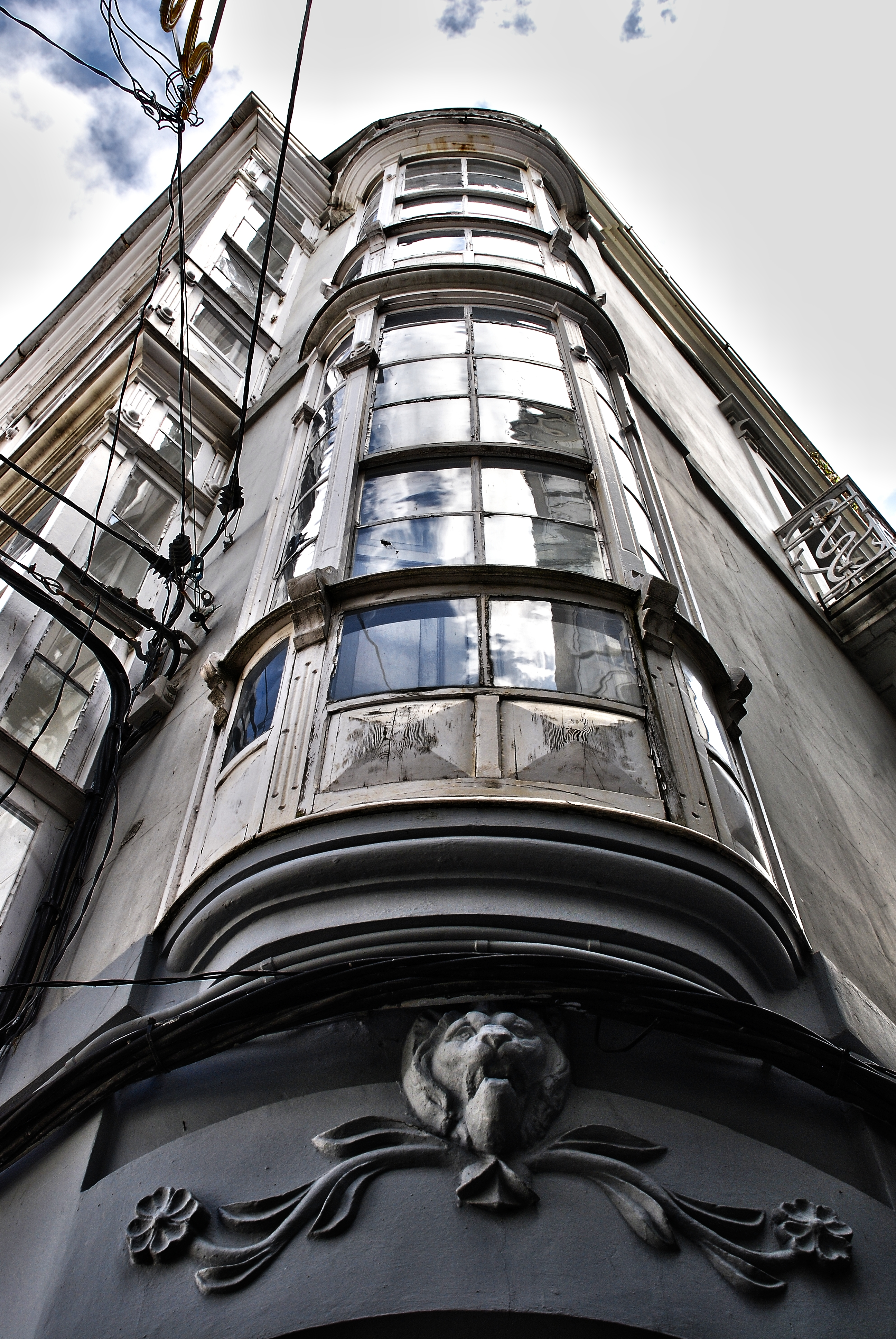 Galerías de Viveiro (HIGH DINAMIC RANGE)